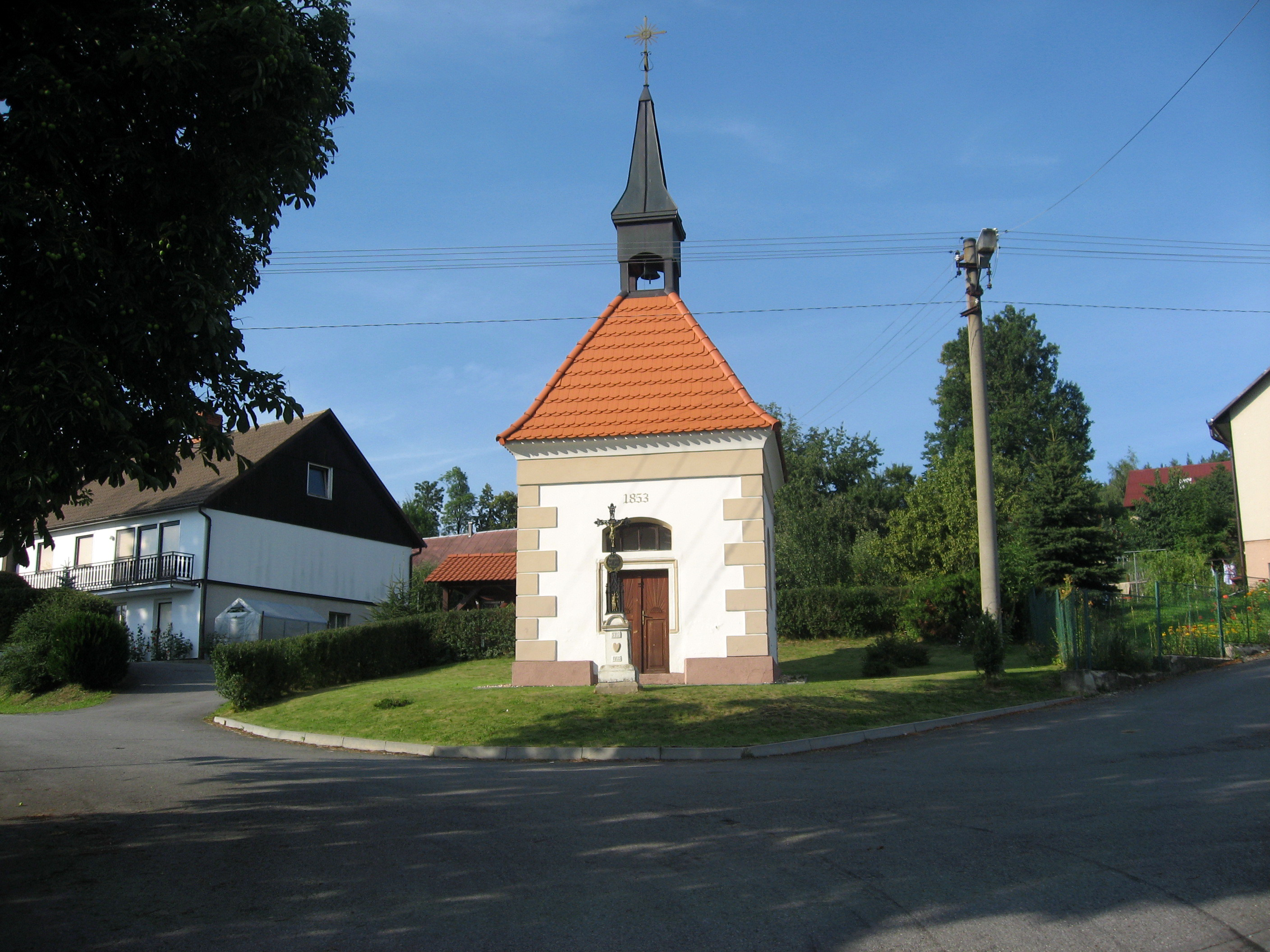 Popelištná, kaple